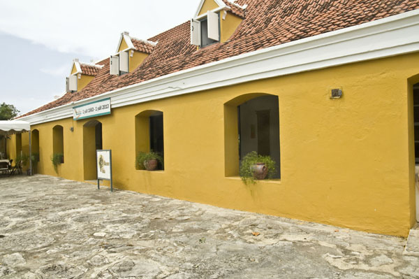 Museo Tula on Curaçao.